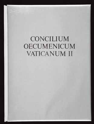 Cover von : Wikipedia:Lothar Wolleh, Das Konzil, II Vatikanisches Konzil, Eine Dokumentation unter Mitwirkung von Pater Emil Schmitz SJ, Radio Vatikan, Stuttgart 1965